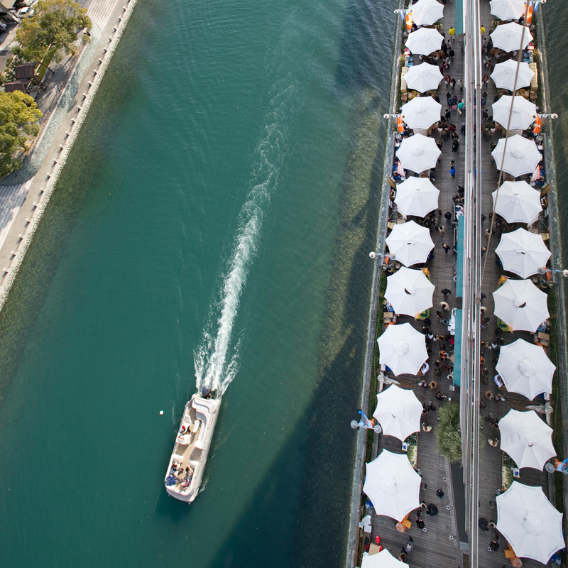 徳島県徳島市しんまちボードウォークで開催されているとくしまマルシェの様子。